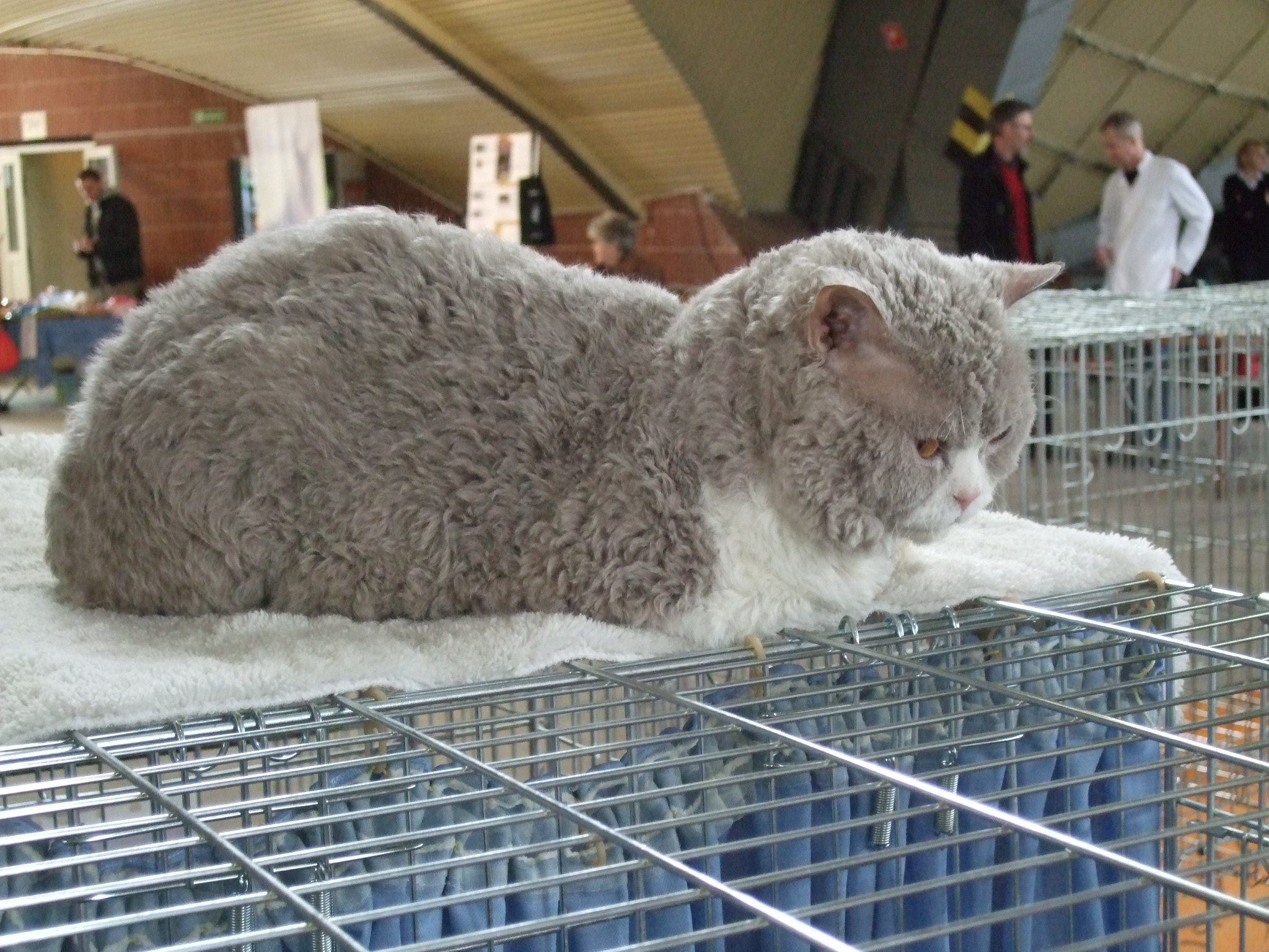 Międzynarodowa Wystawa Kotów Rasowych w Chorzowie.